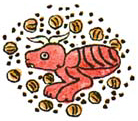 Aztec glyph for Azcapotzalco.